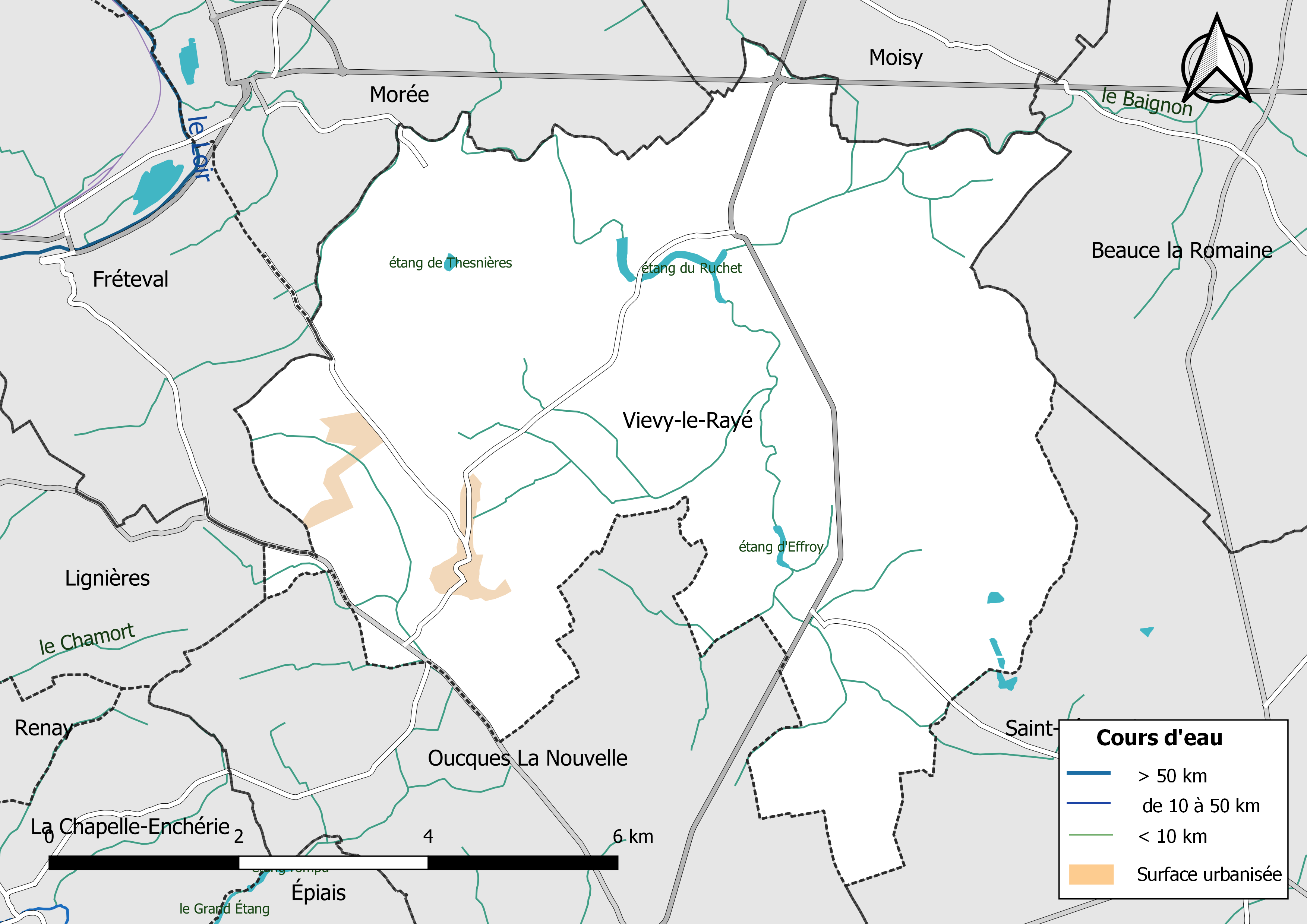 Carte du réseau hydrographique de la commune de Vievy-le-Rayé (Loir-et-Cher, France).